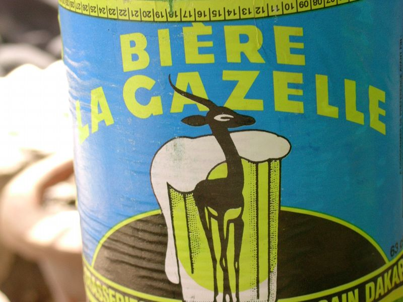 Bouteille de bière Gazelle (Sénégal)